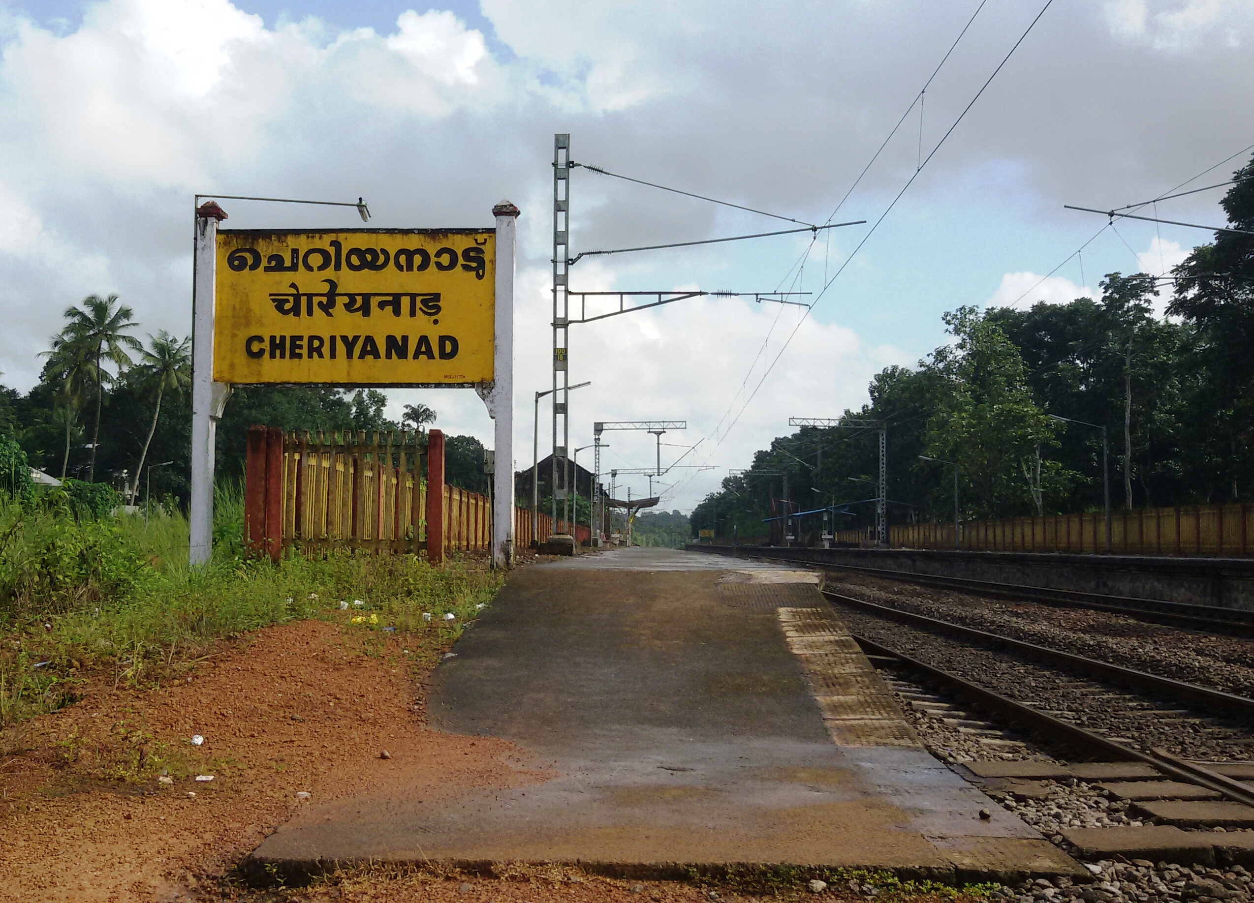 ചെറിയനാട് റെയില്‍വേ സ്റ്റേഷന്‍